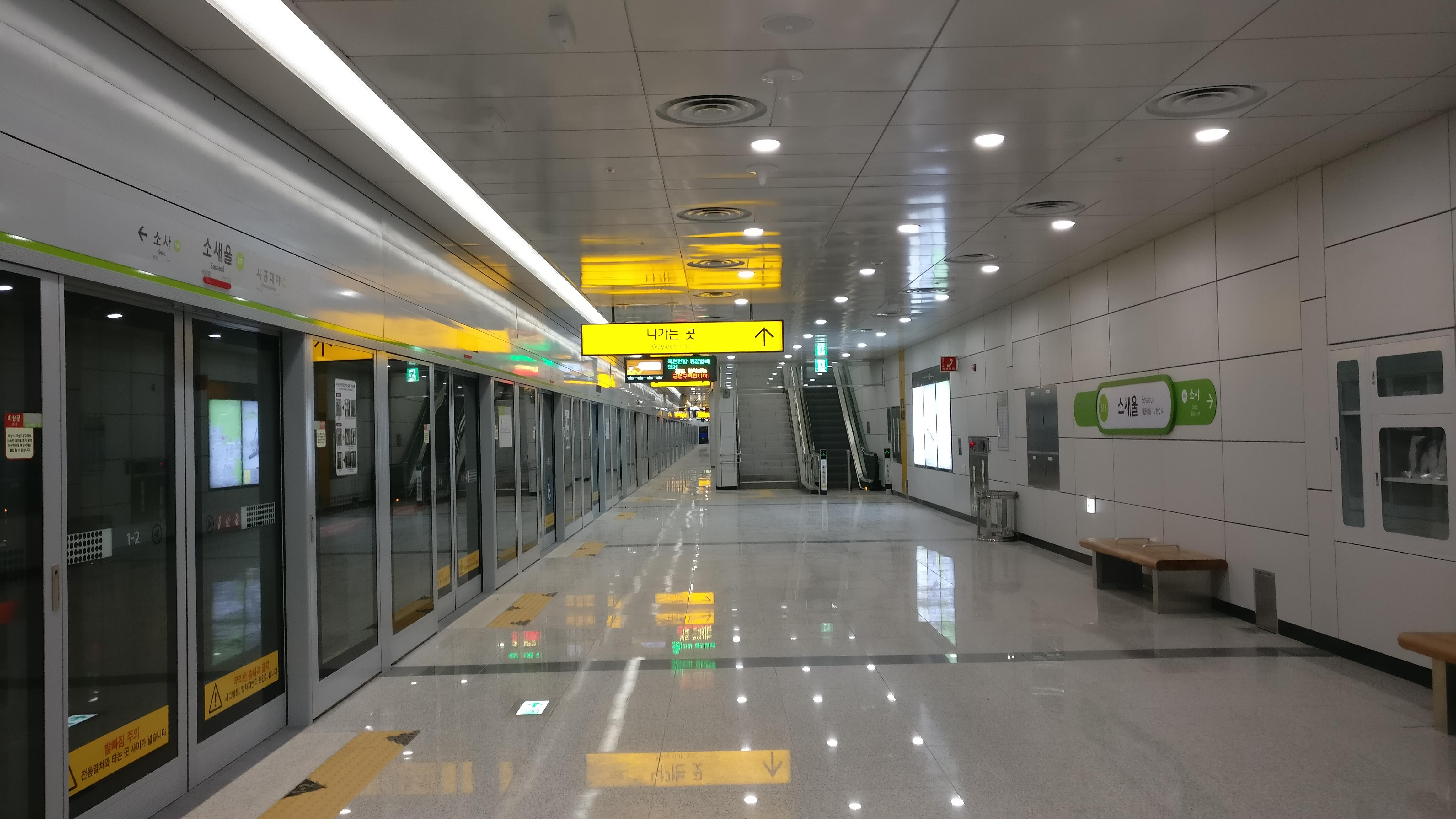 서해선 소새울역 승강장(소사역 방향)